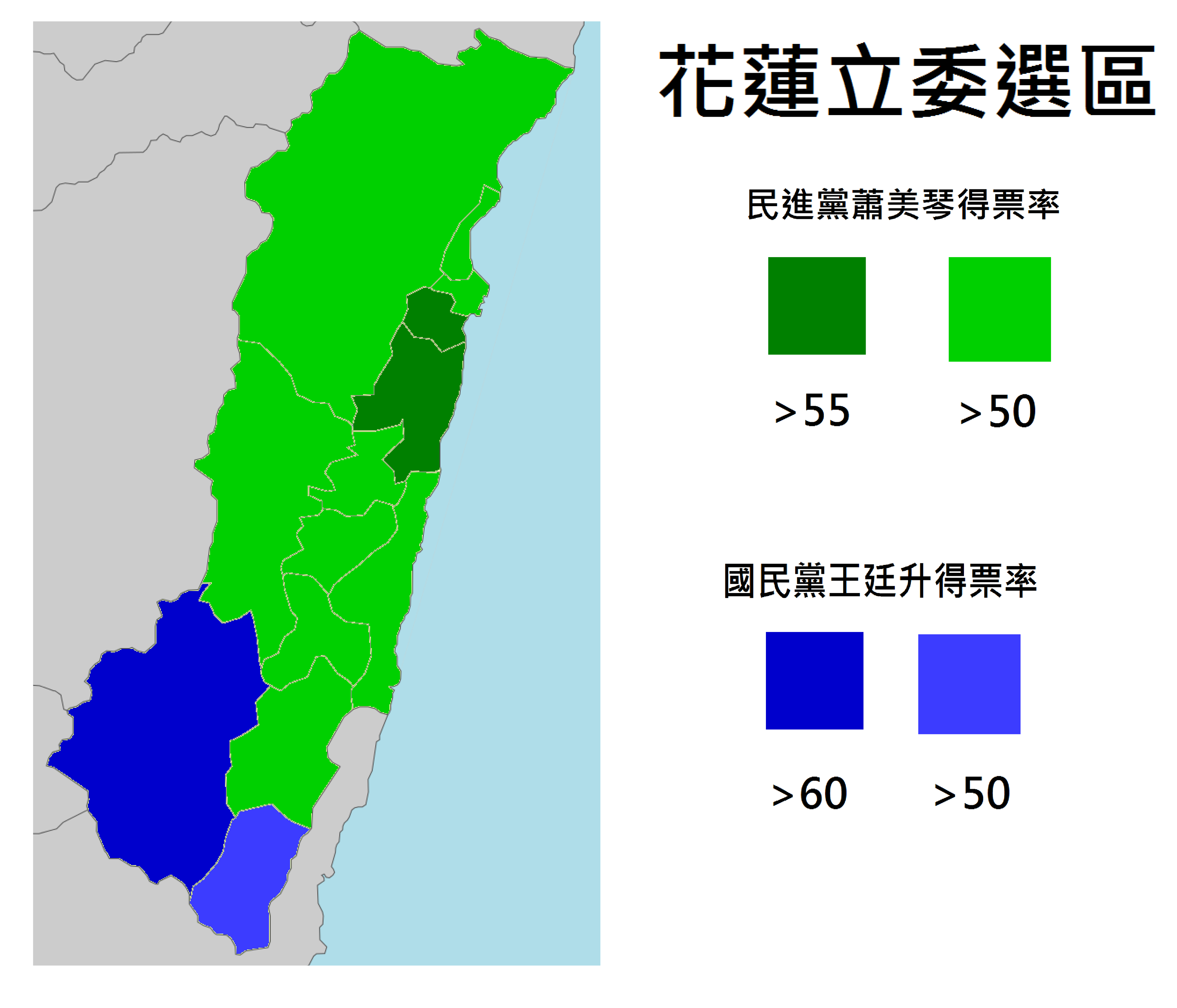 2016花蓮立委各鄉鎮市 得票率